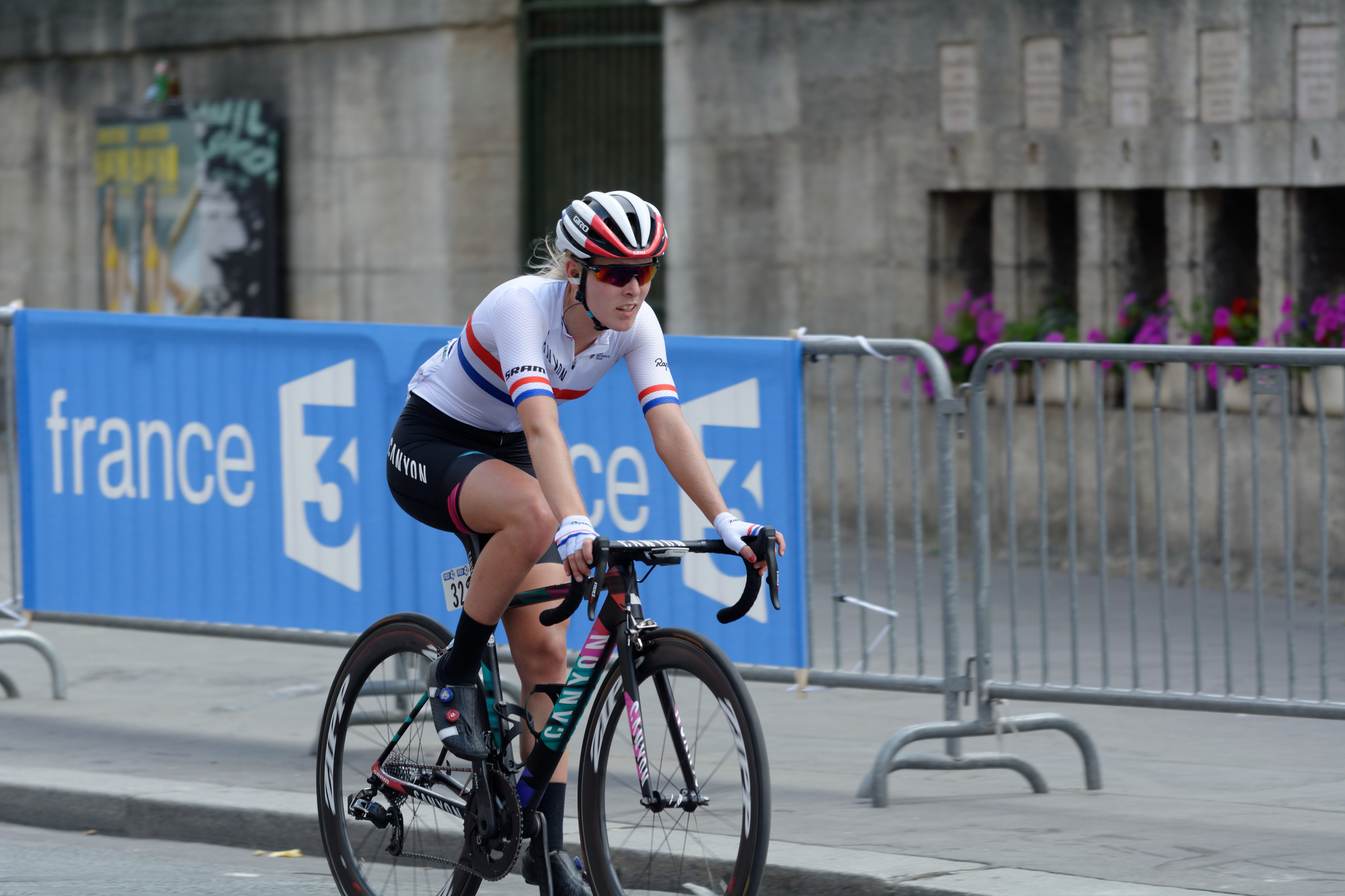 D71_9696_DxO